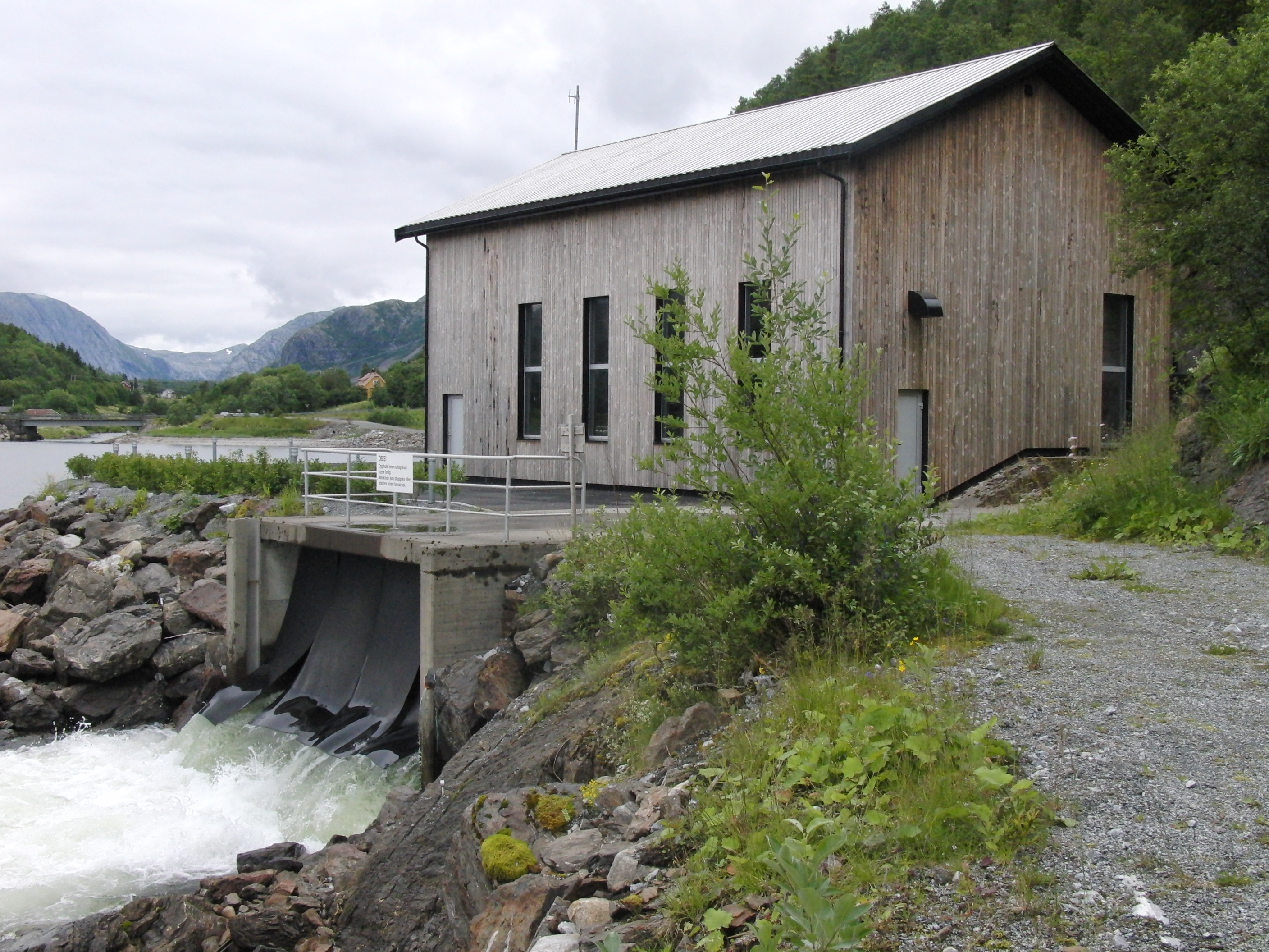 Forsland kraftverk